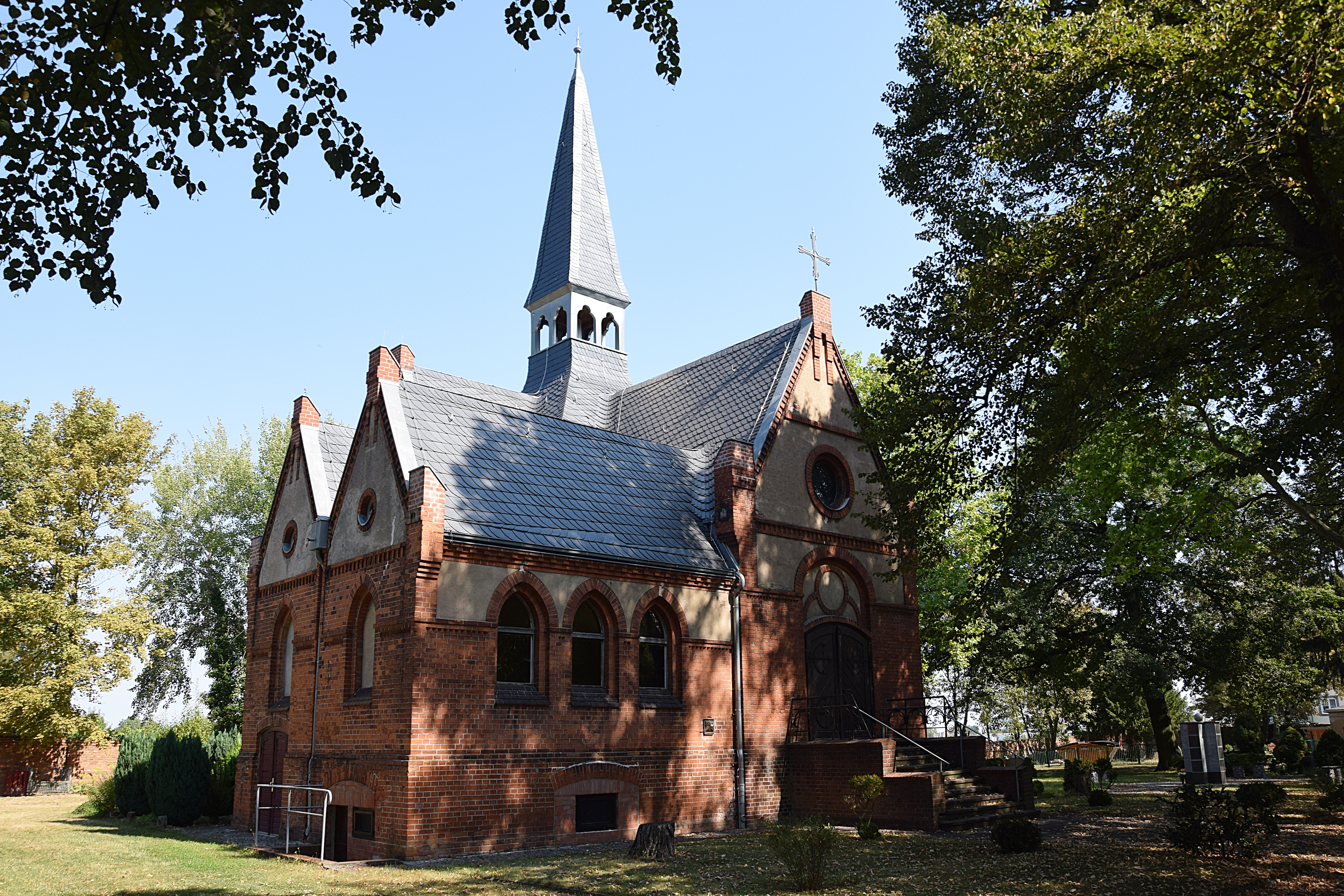 Friedhofskapelle des Neuen Sudenburger Friedhofs in Magdeburg